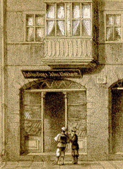 Ladengeschäft von Friedrich Julius Klinkhardt in der Nicolaistrasse 46 in Leipzig